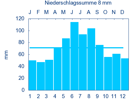 Mittelwerte von 1961 - 1990, generiert mit awk und gnuplot